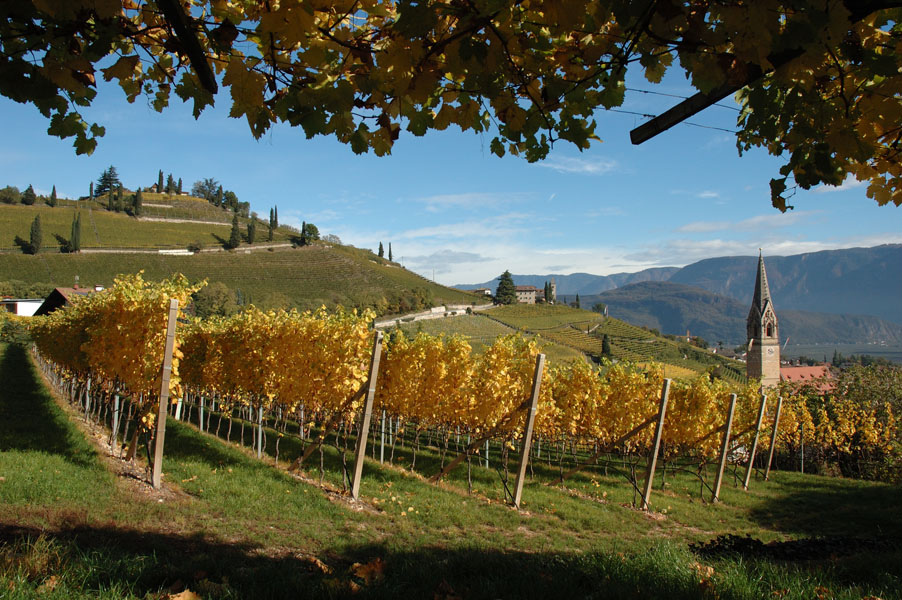 Tramin im Herbst